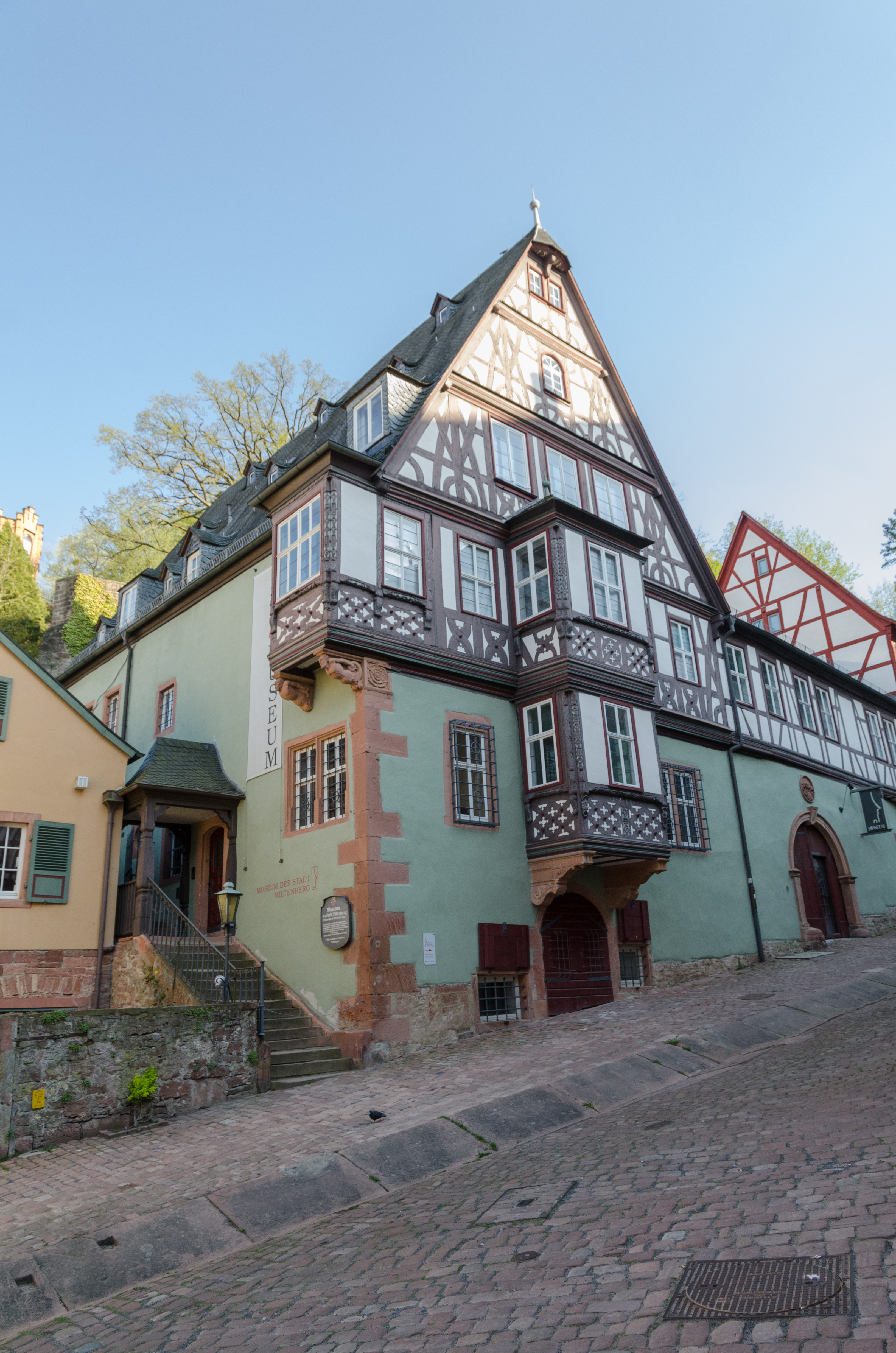 Miltenberg, Hauptstraße 171